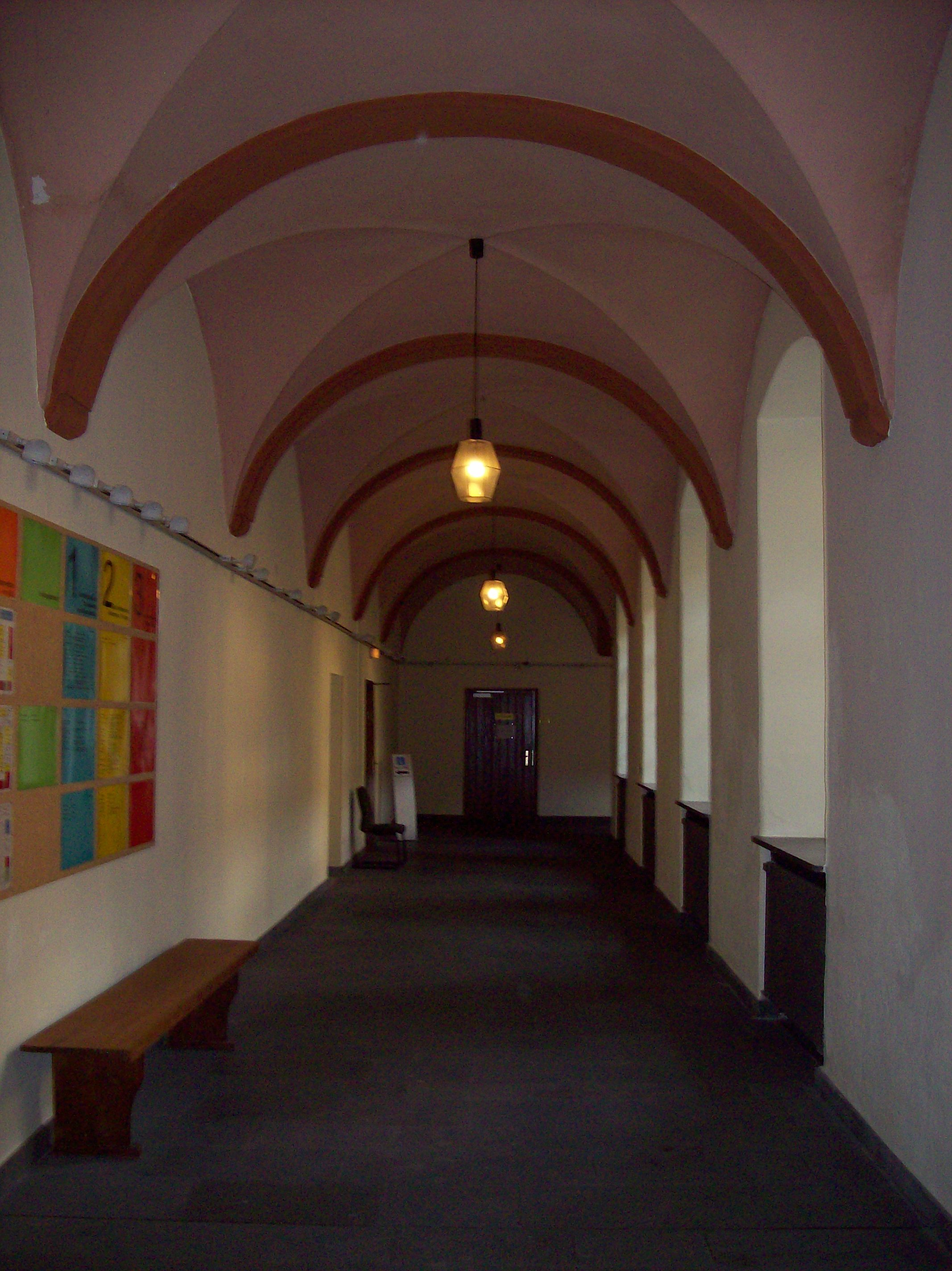 Südachse der Kreuzgangs des Karmeliterklosters in Boppard